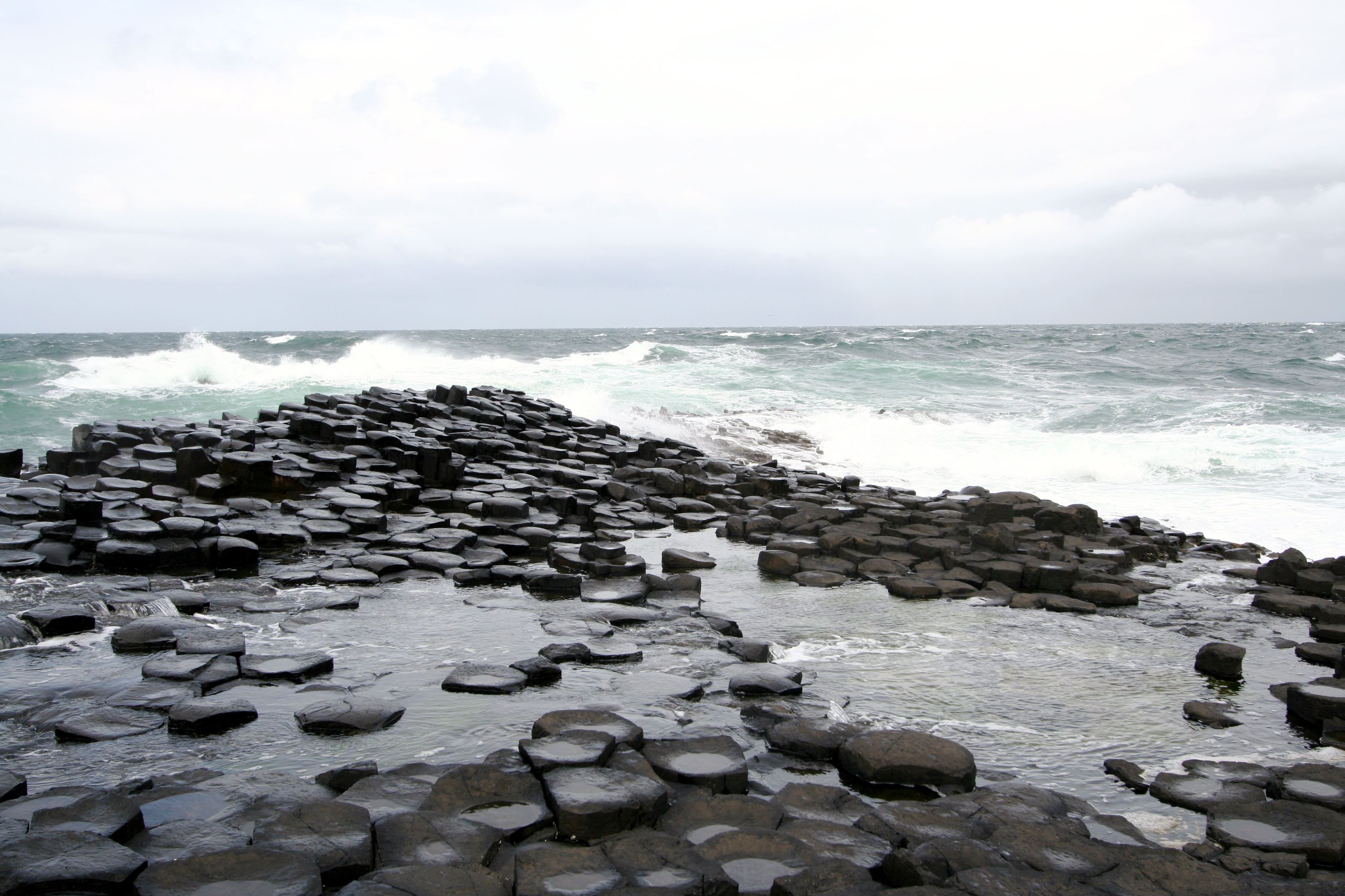 Calzada de los gigantes (Giant´s causeway) condado de Atrim